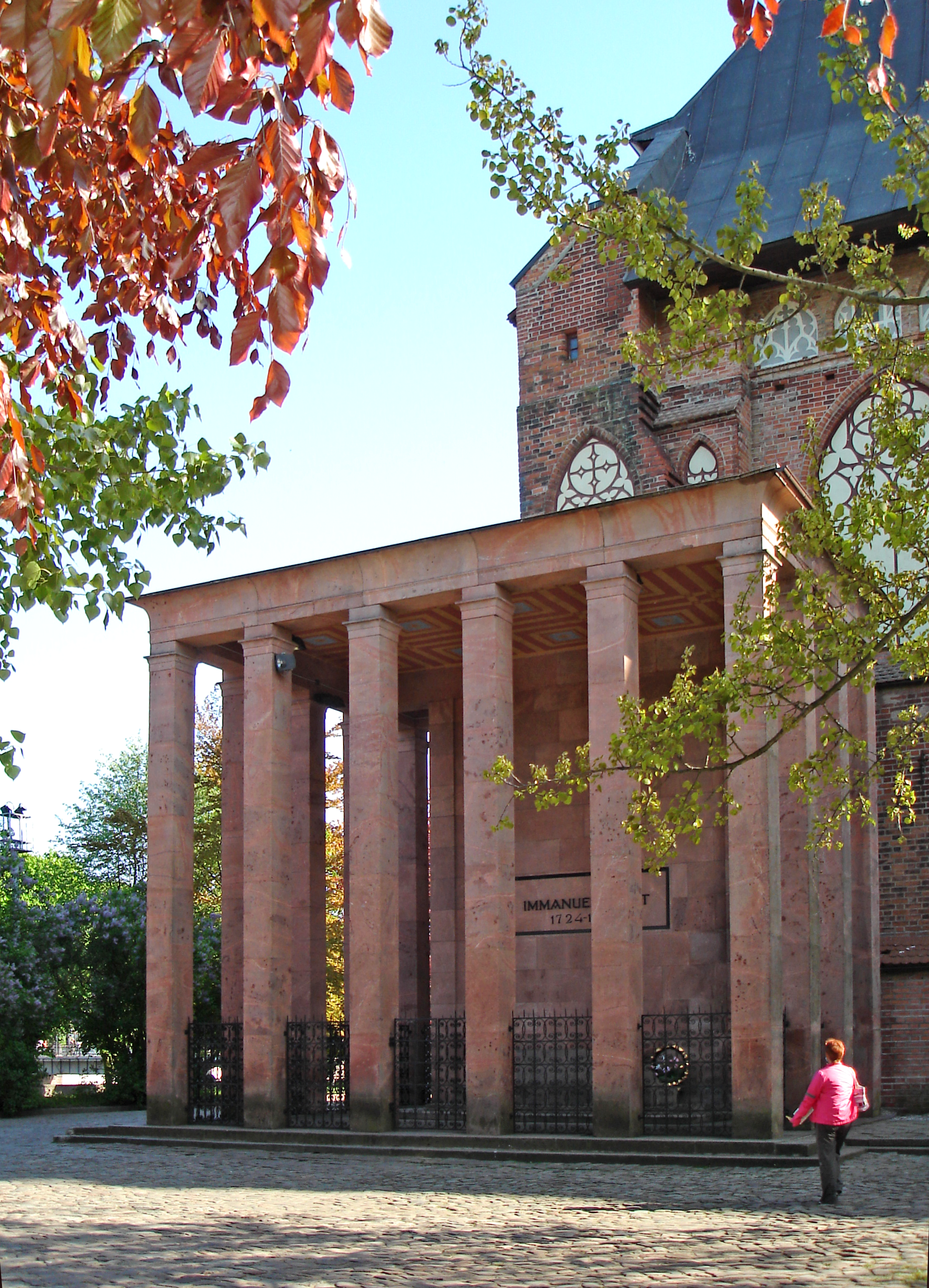 Grabmal Immanuel Kants in Kaliningrad (ehemaliges Königsberg), Russische Föderation.